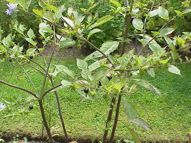 Species: Atropa bella-donna Family: Solanaceae Image No. 2